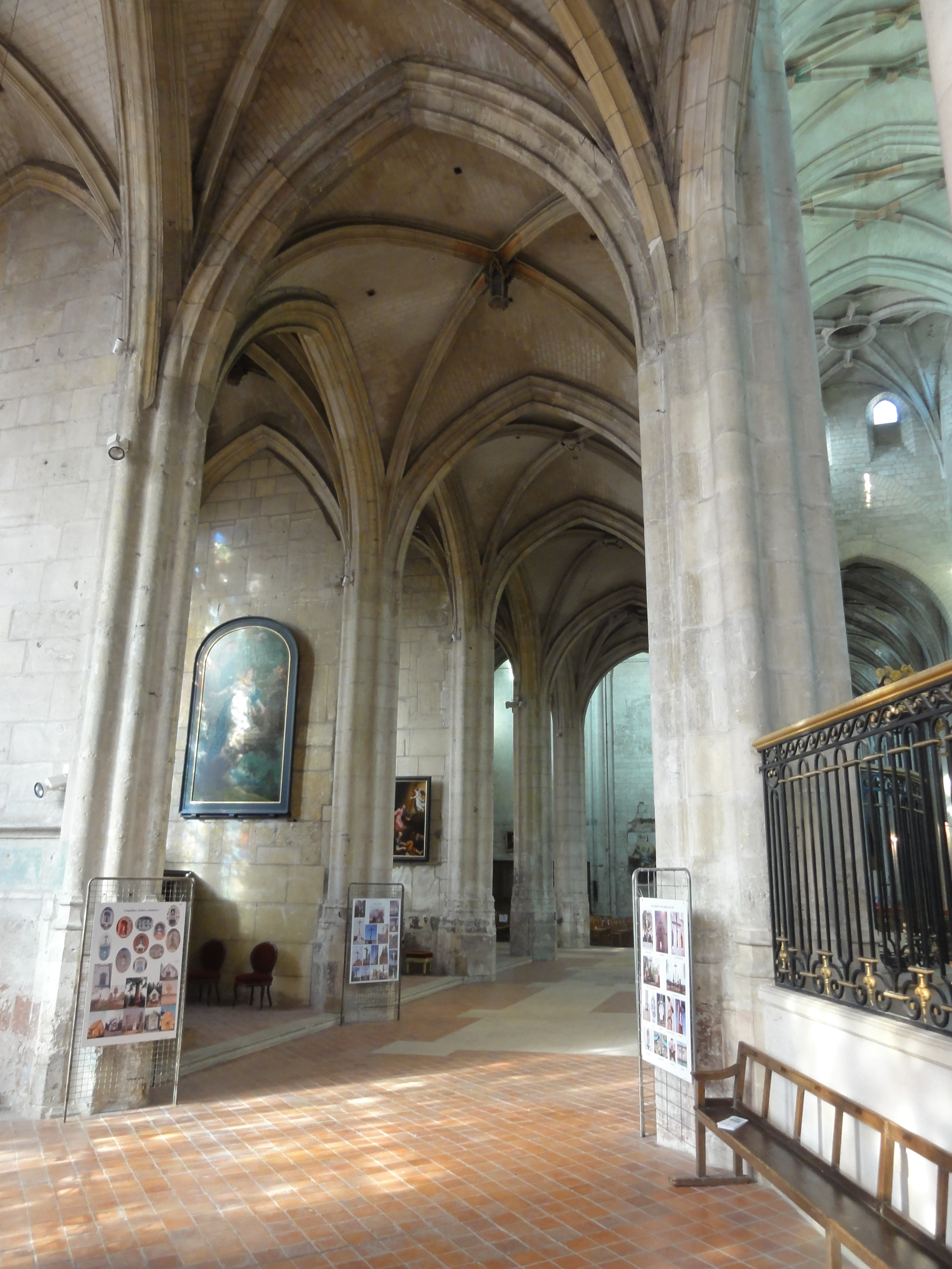 Collatéral sud, vue vers l'ouest.